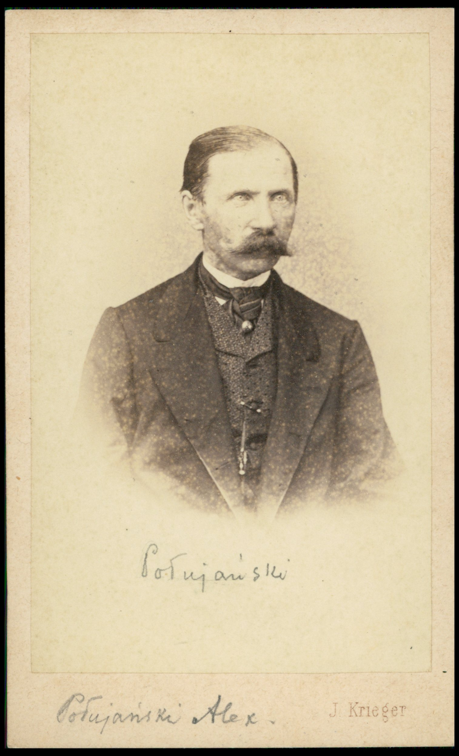 Aleksander Połujański, 1865 r.